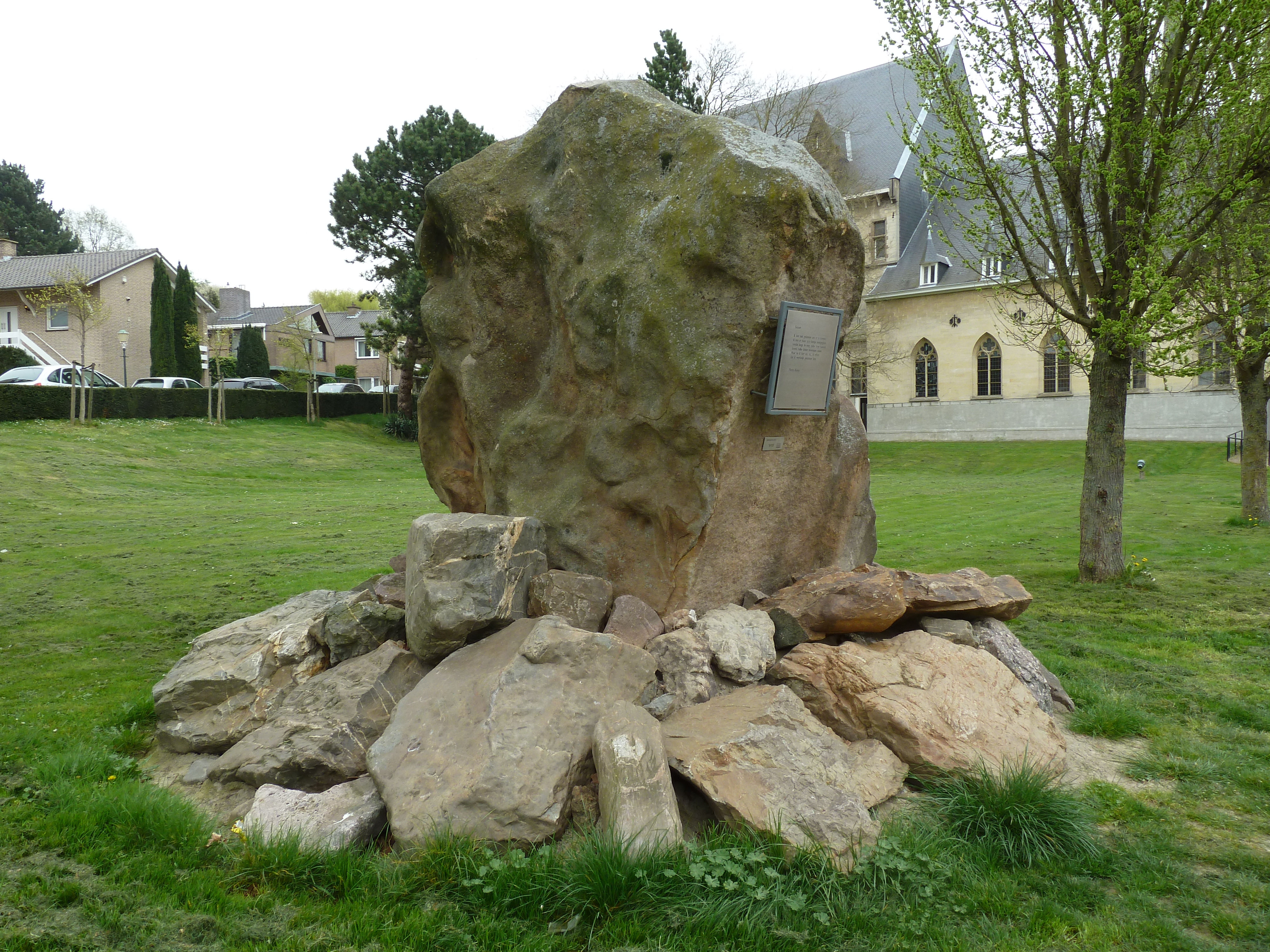 De grote kei van Valkenburg, Limburg, Nederland